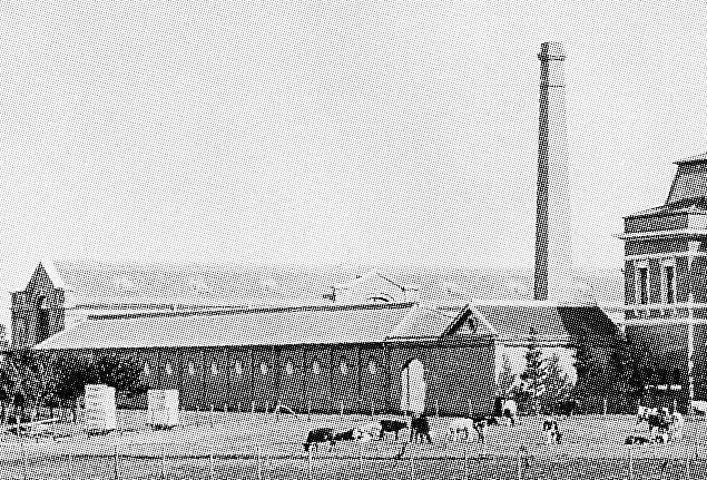 明治38年頃のシャトー貯蔵庫